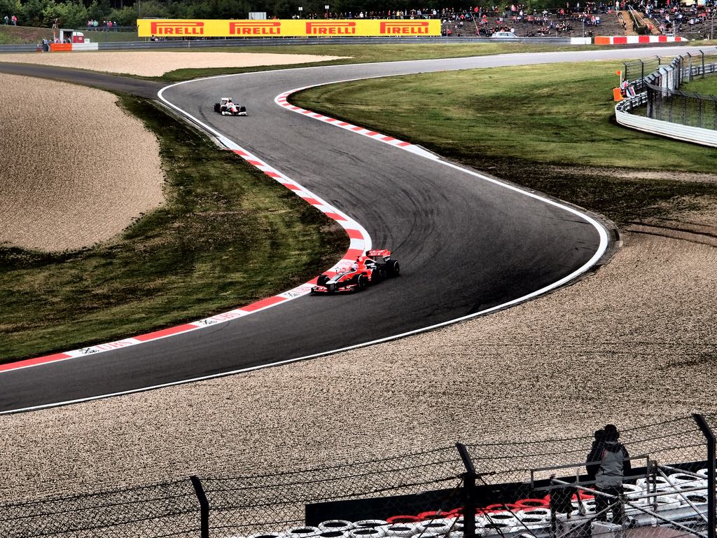 Virgin Racing et HRT au Nurburgring en 2011